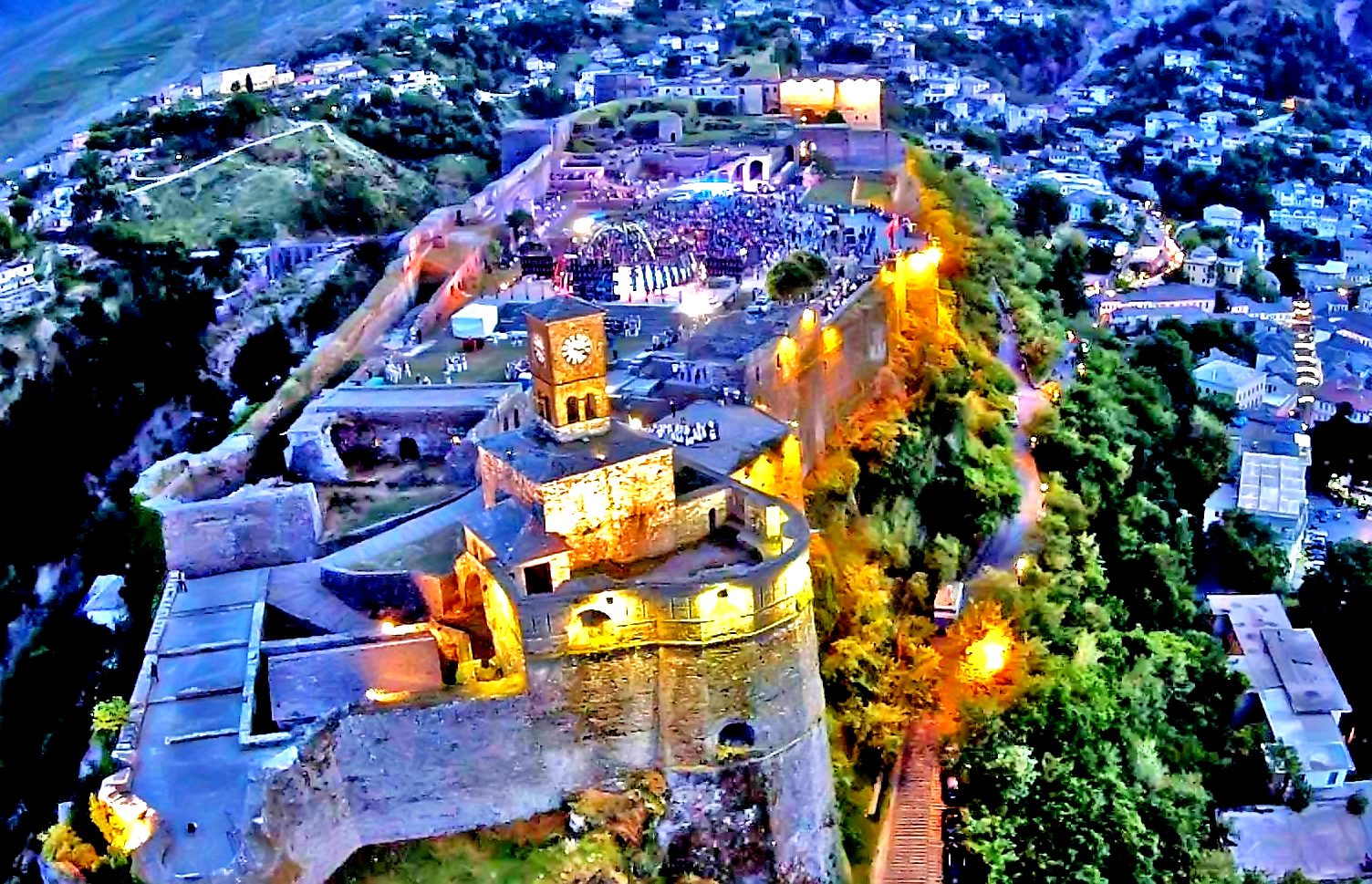 Gjirokastra 2015 - K TORO